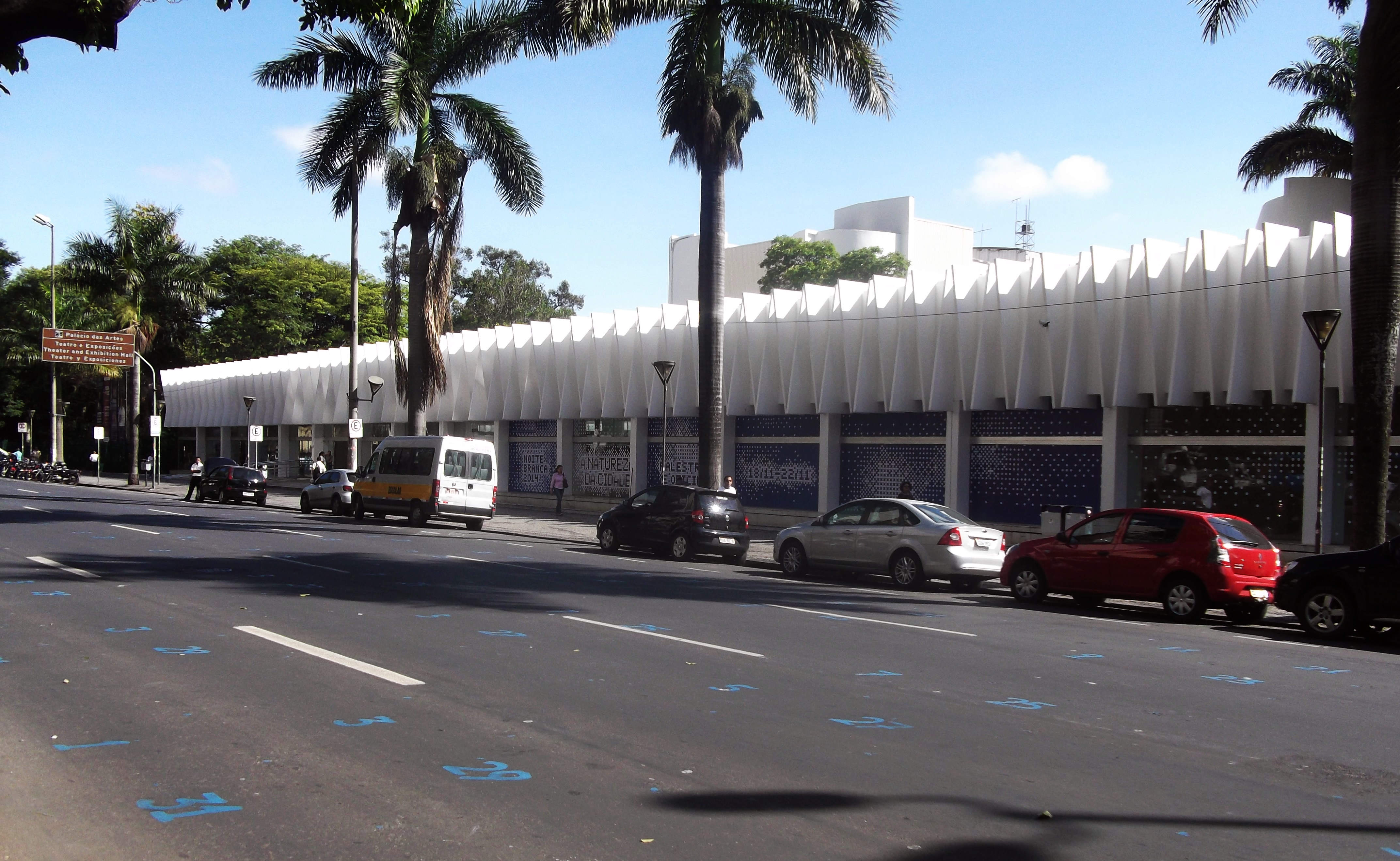 Palácio das Artes, Belo Horizonte, Brasil